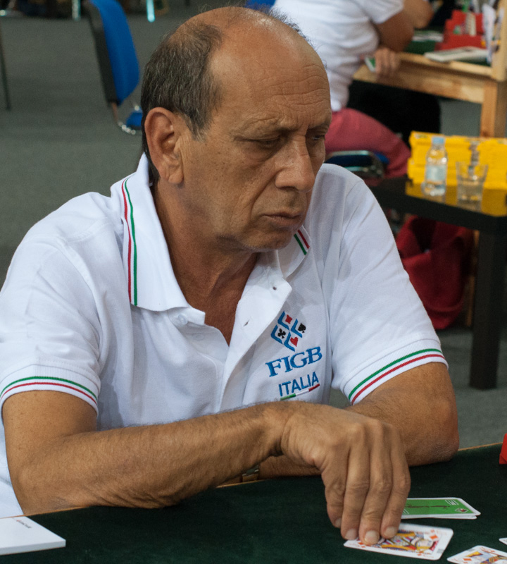 Italy Lauria Lorenzo